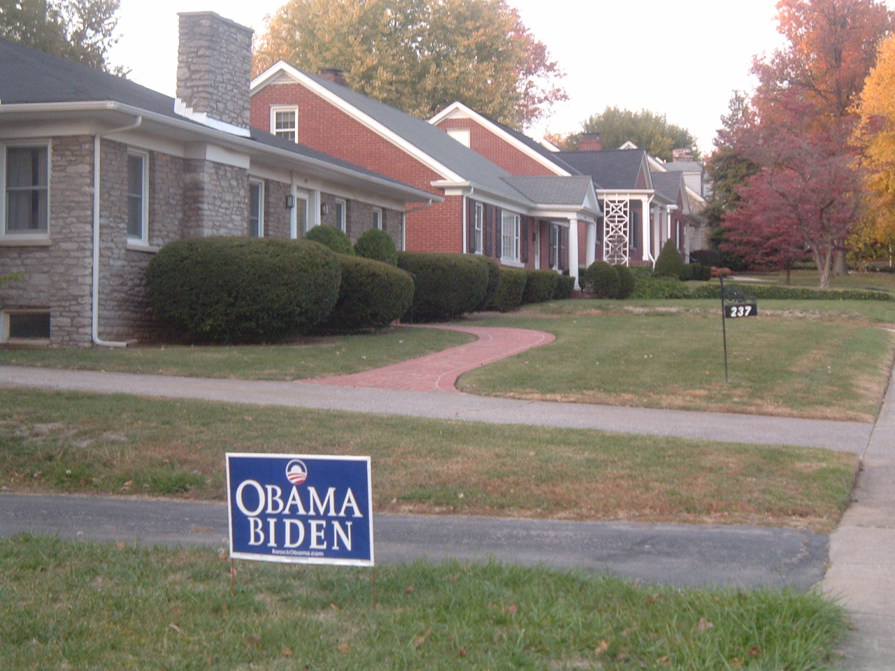 ഒബാമ / ബൈഡൻ പ്രസിഡന്റ് തിരഞ്ഞെടുപ്പ് പ്രചരണം